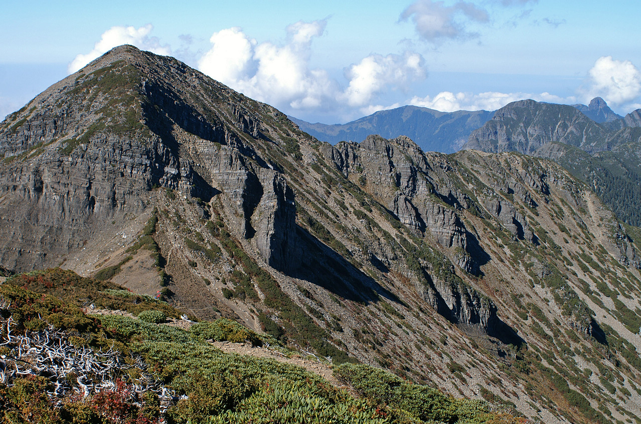 The Holy ridgeline 聖稜線